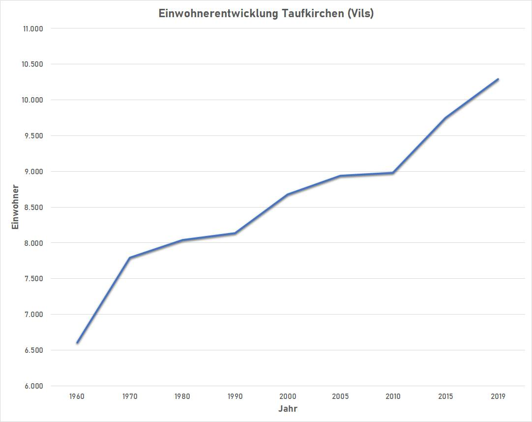 Entwicklung der Einwohnerzahlen von 1960 bis 2019